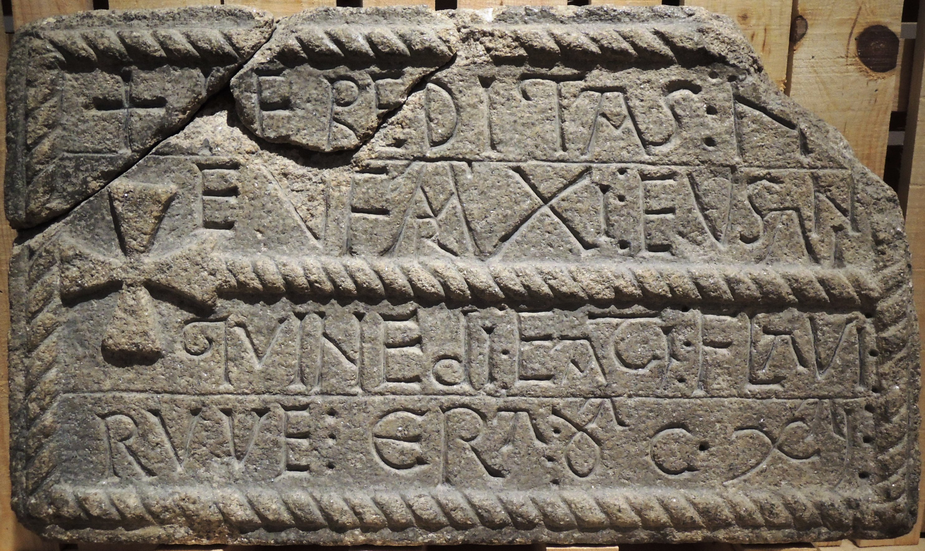 Lapida Fundacional de San Pedro de Rocas. Siglo VII. Museo Arqueológico de Ourense